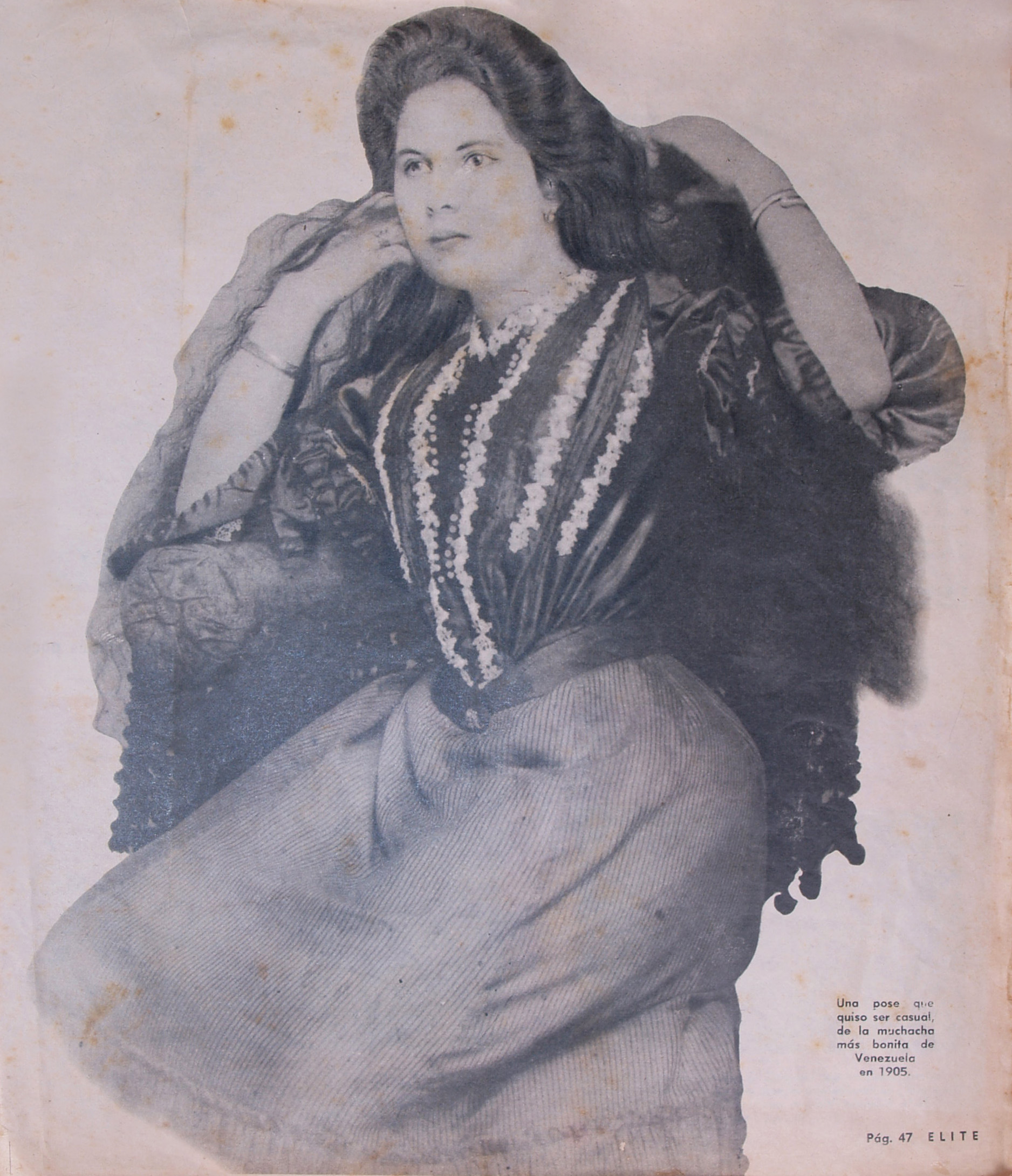 Foto de Manuela Victoria Mujica de Linares, 1ra Miss venezuela